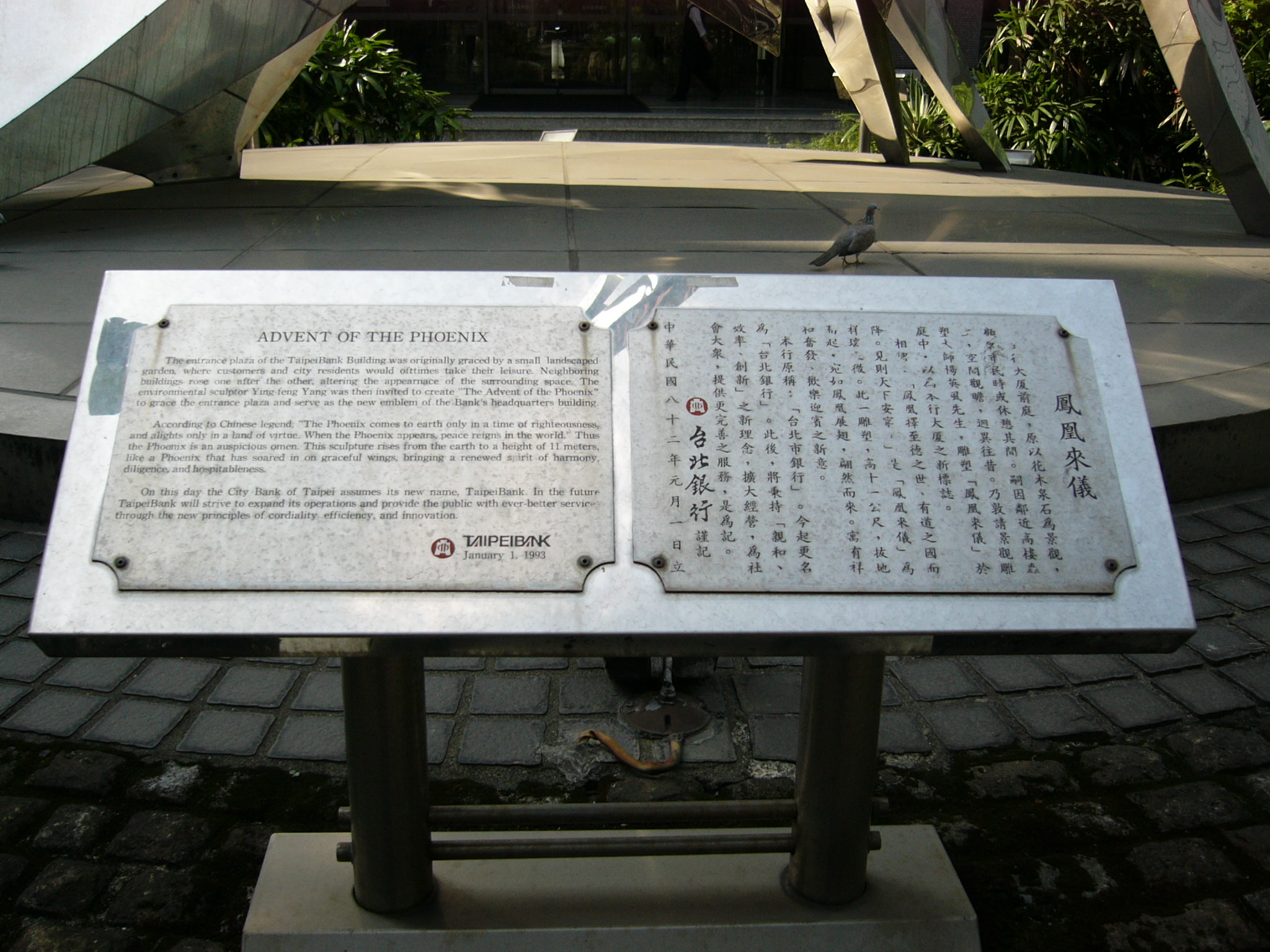 台北富邦銀行中山大樓前面的楊英風雕塑作品「鳳凰來儀」複製品解說牌，1993年（中華民國82年）1月1日台北銀行設立，而該日是「台北市銀行」更名為「台北銀行」的日期。